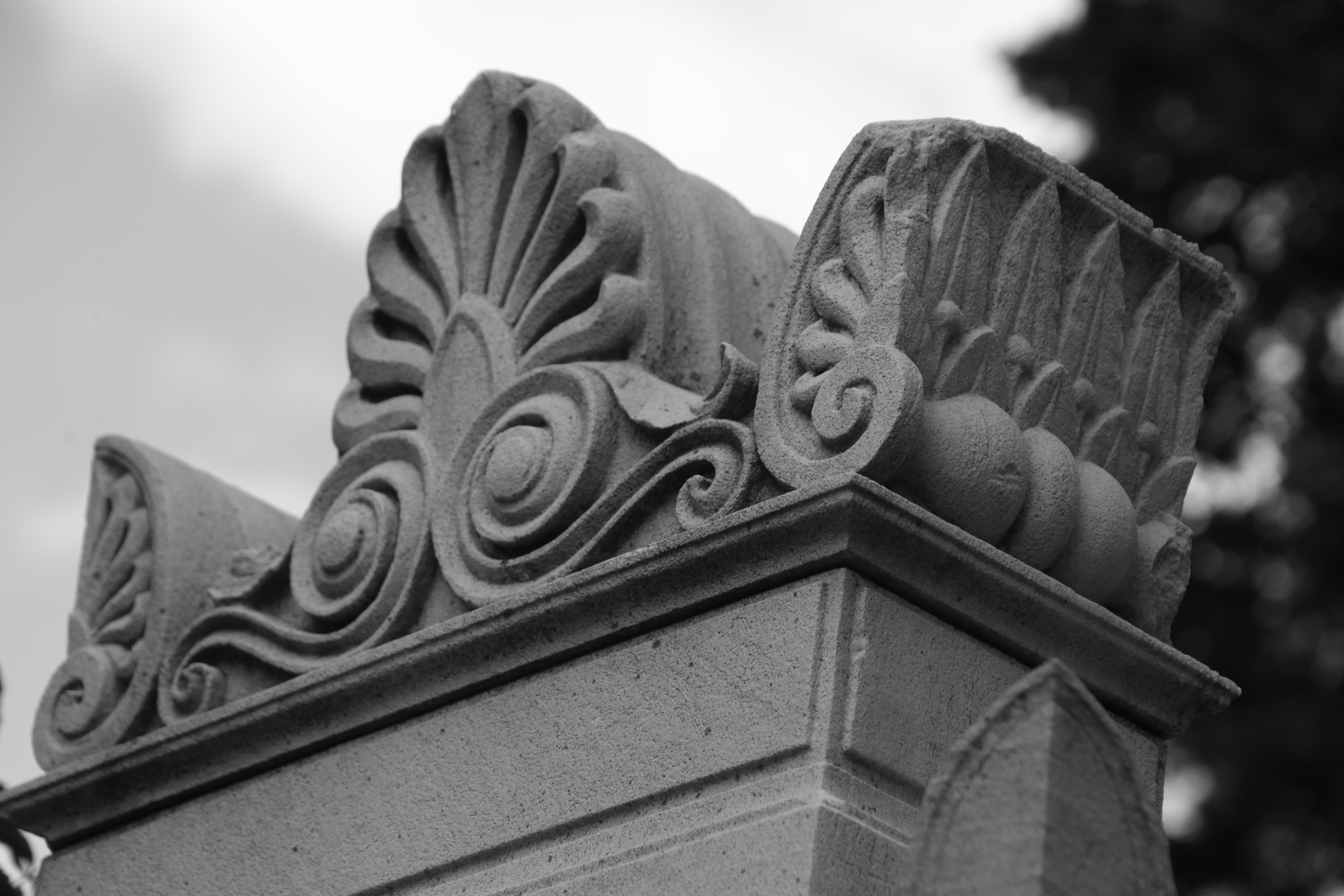 Mausoleen am alten Jüdischen Friedhof Dieses Bild wurde anlässlich des österreichischen Tags des Denkmals 2013 in Wien eingereicht.